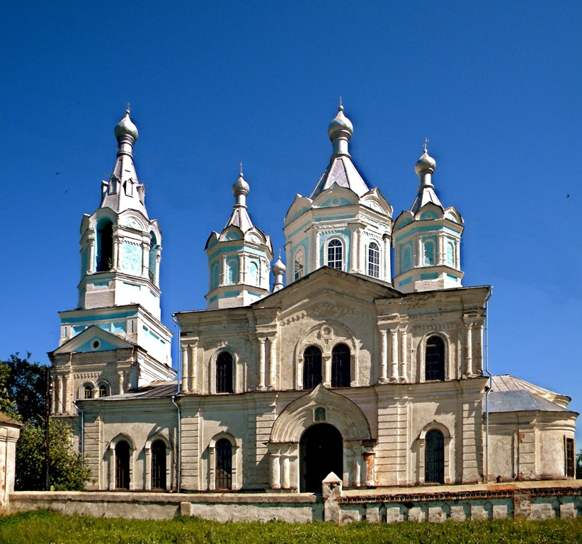 Знаменский храм в селе Борки Суджанского района Курской области